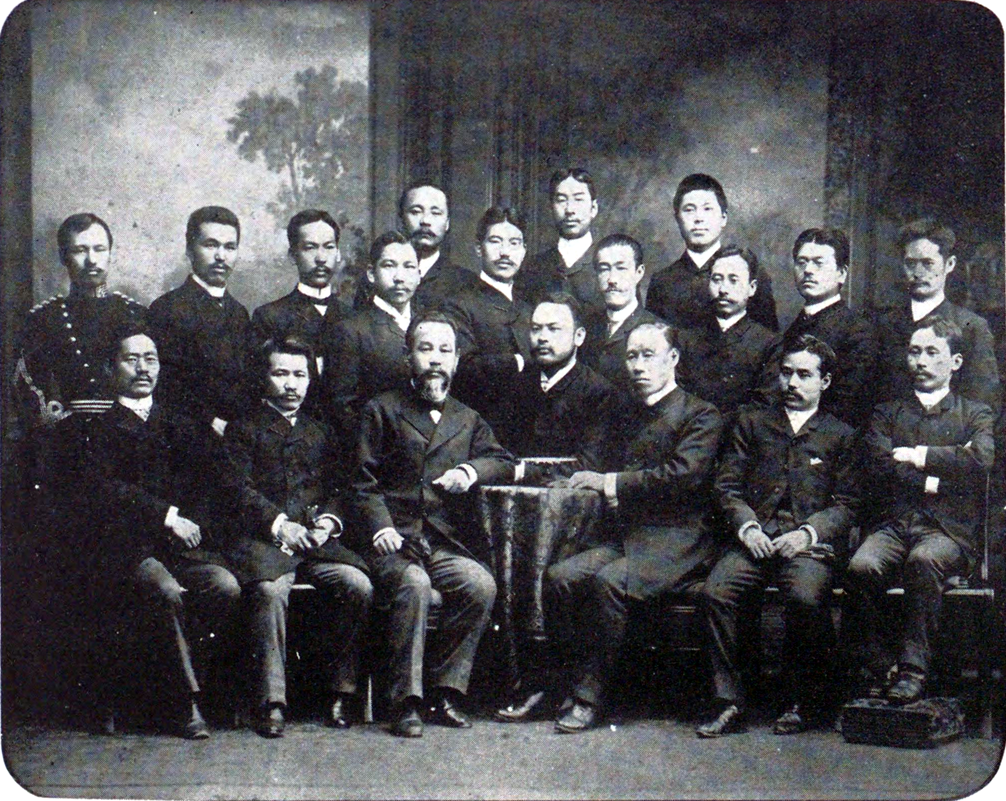 石黑忠悳著『石黑忠悳懷舊九十年』博文館、1936年。